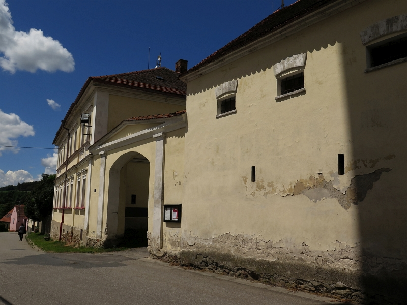 Fara, Volenice 1, Volenice (okres Strakonice).